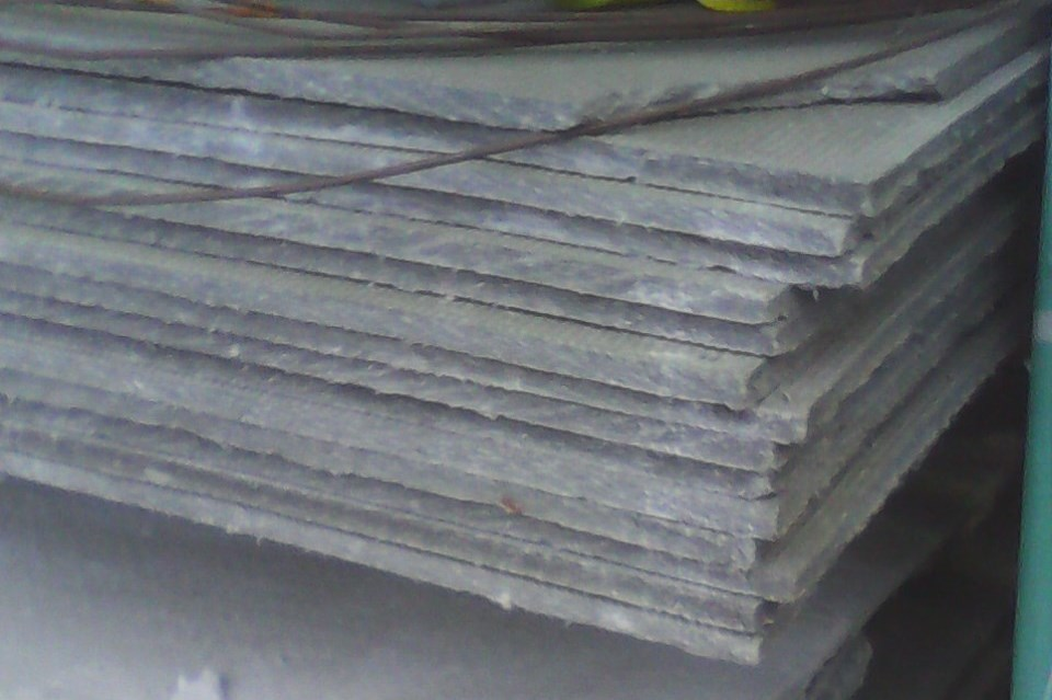 Асбестоцементный лист толщиной 10 мм